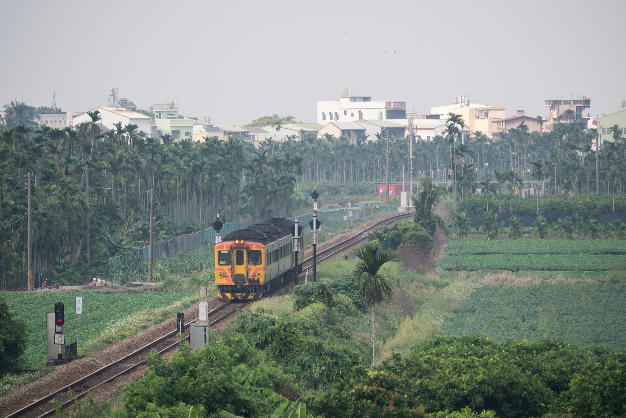 第 3523 車次區間車（DR2800）逆行屏東線